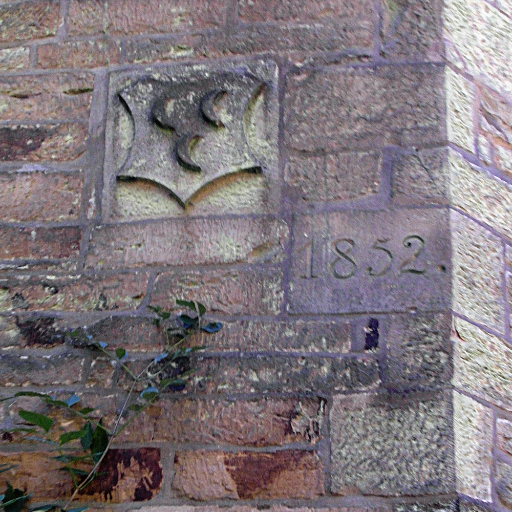 Jahreszahl und Wappen am Belvedereturm auf dem Strutzberg bei Bad Nenndorf in Niedersachsen